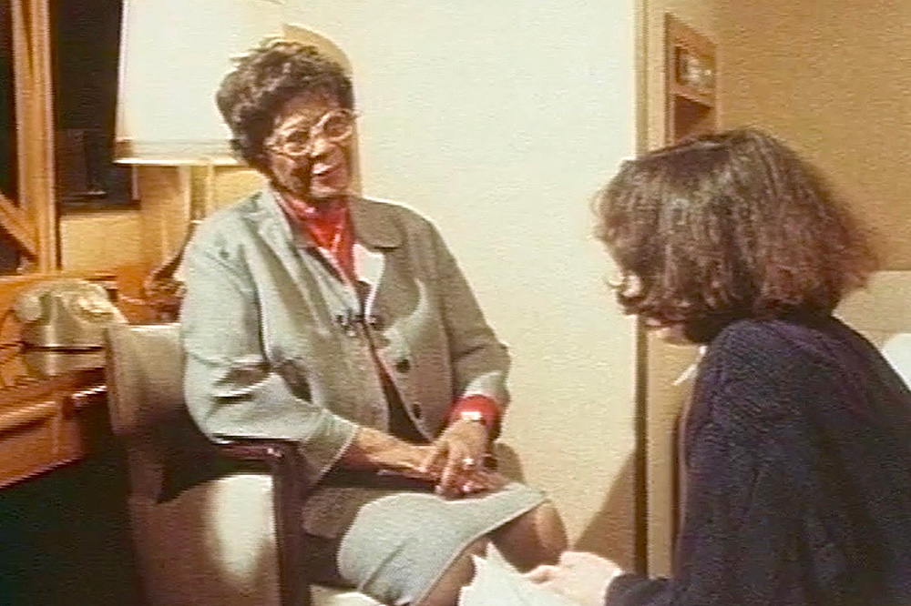 Milano - Hotel Duomo - Maggio 1984 - intervista a Ella Fitzgerald